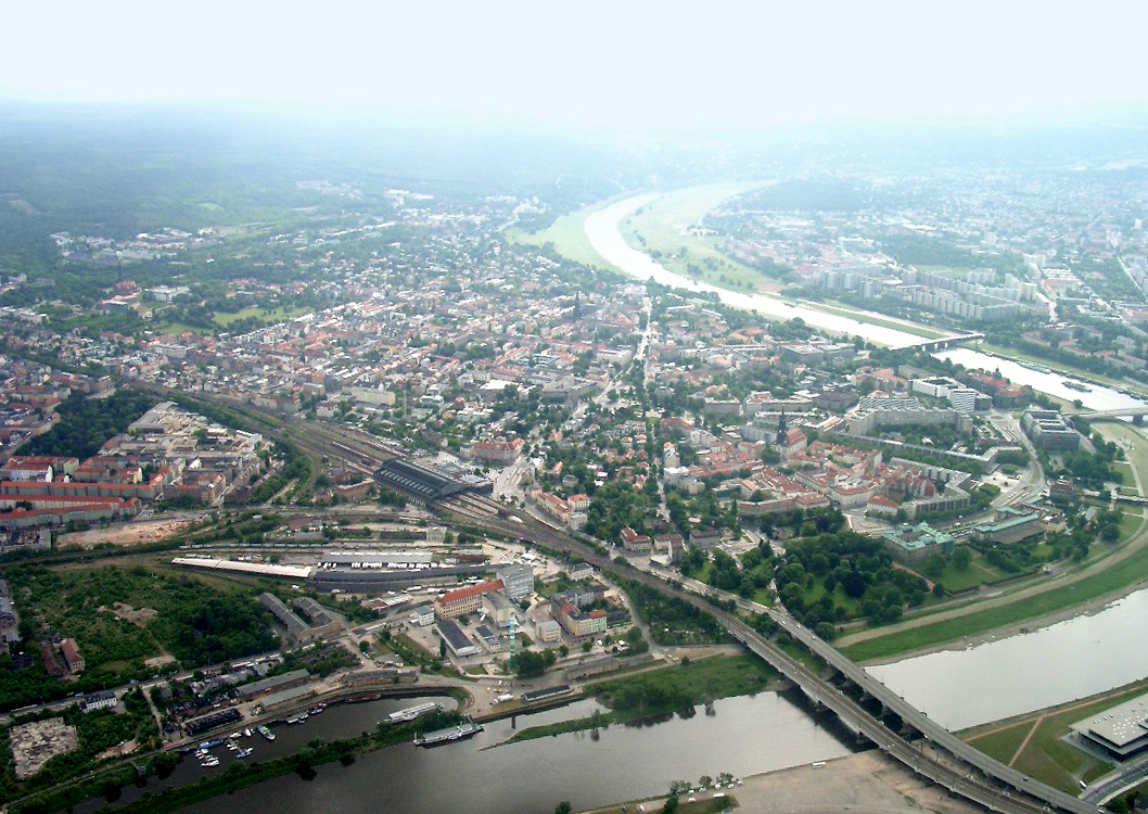 Luftbild der Dresdner Neustadt (Innere und Äußere) und der Leipziger Vorstadt; auf der anderen Elbseite sieht man noch die Johannstadt. Außerdem sind die vier innerstädtischen Brücken Albertbrücke, Carolabrücke, Augustusbrücke und Marienbrücke (eigentlich zwei seperate Brücken für Auto- und Schienenverkehr) zu sehen. Der Neustädter Bahnhof und Albertplatz (sternförmige Kreuzung) bilden weitere markante Bildpunkte.